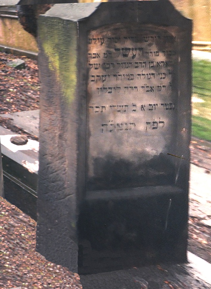 קבר רבי העשיל